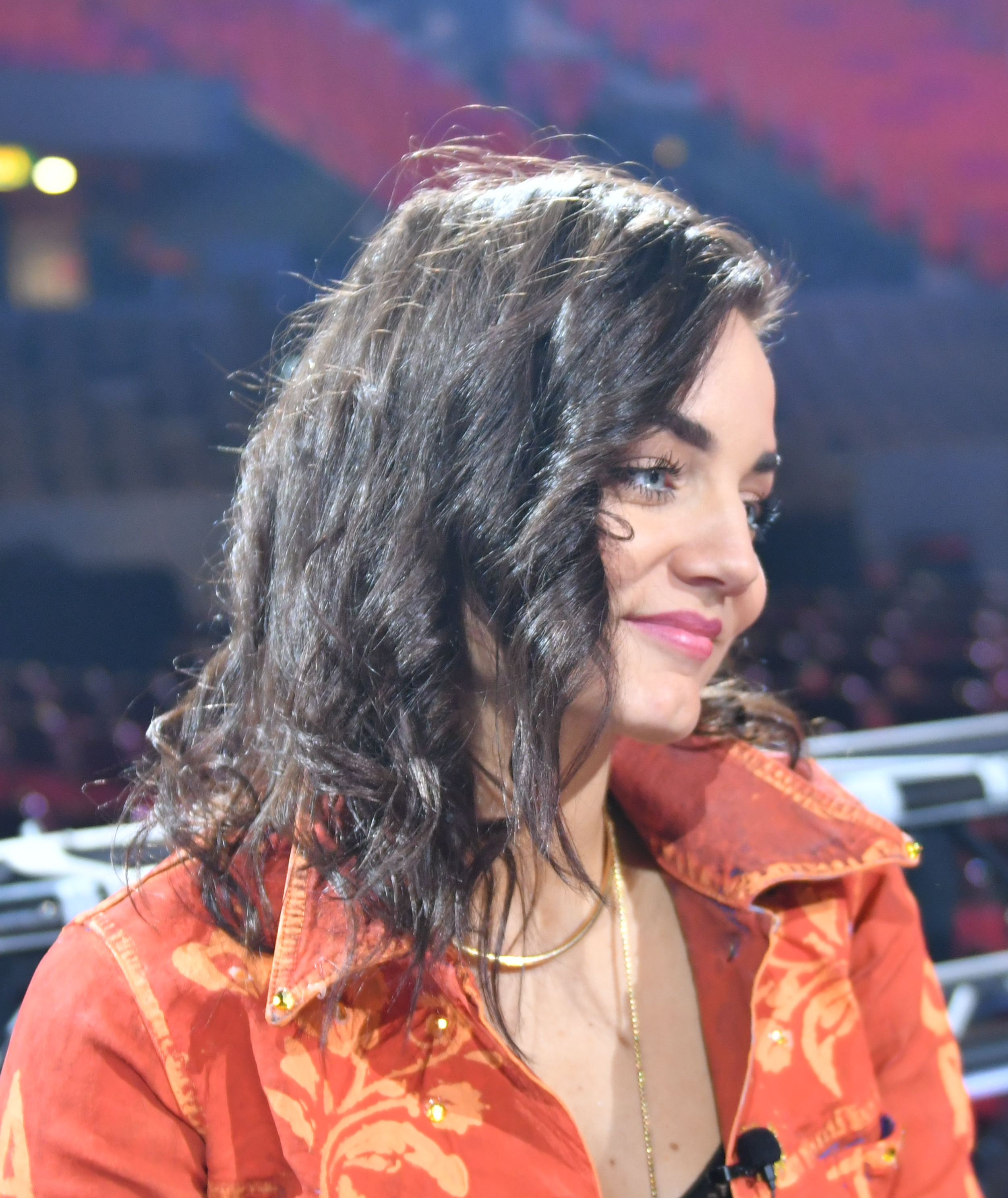 Melodifestivalen 2018, Presskonferens, Deltävling 2 , Scandinavium, Göteborg, Mimi Werner